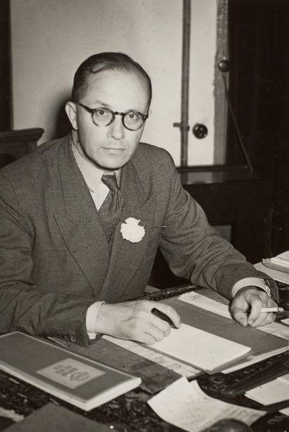 Portret van mr. A.A.M. Struycken, minister van Justitie, achter zijn nieuwe bureau na zijn benoeming. 29 juni 1950.